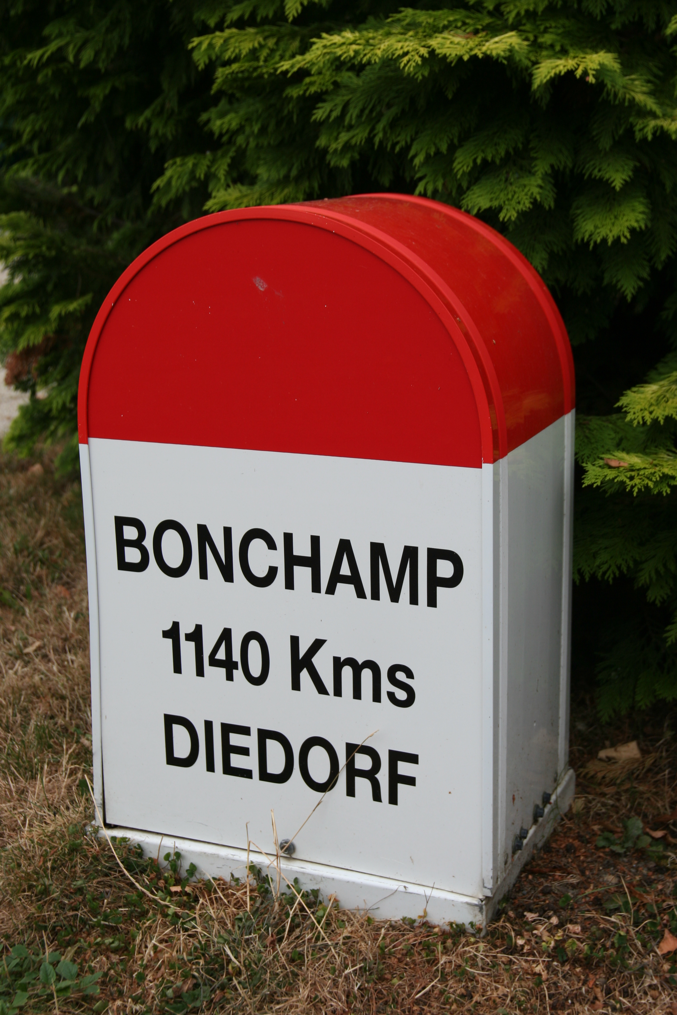 Borne devant la mairie de Bonchamp-lès-Laval indiquant la distance avec la ville jumelle de Diedorf.